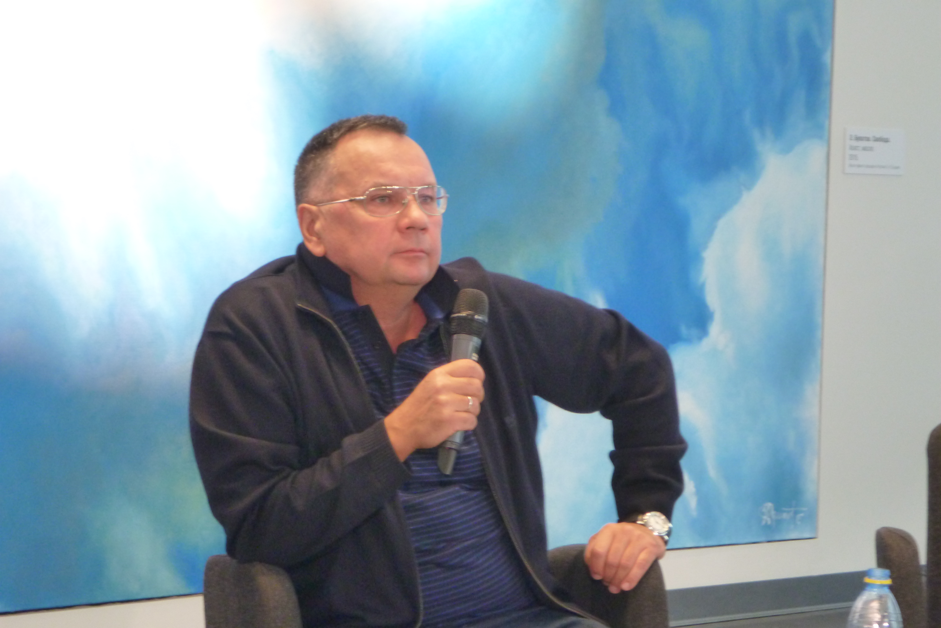 Раф Шакиров в Ельцин-центре 29 июня 2019 года